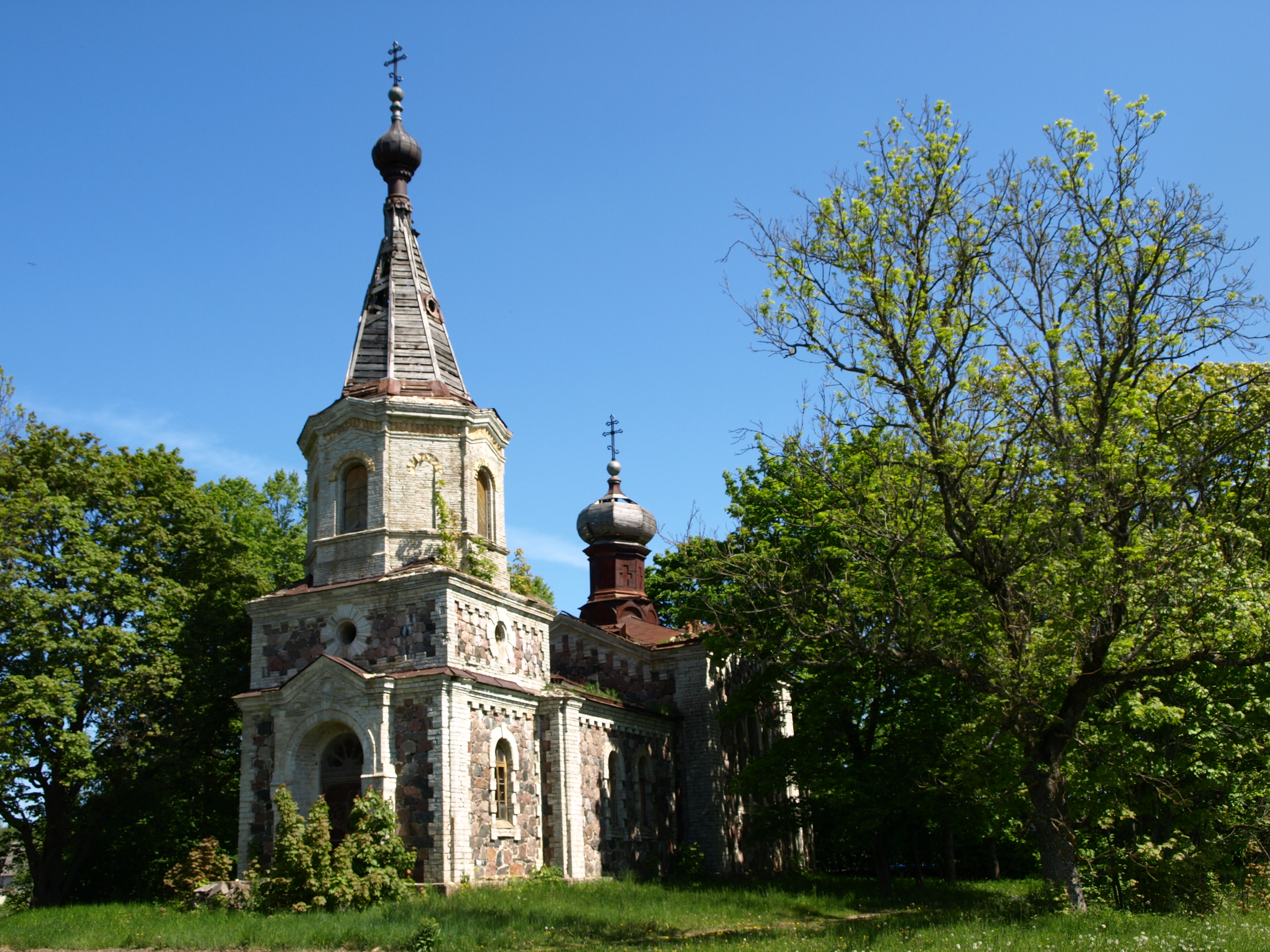 Väike-Lähtru õigeusu kirik